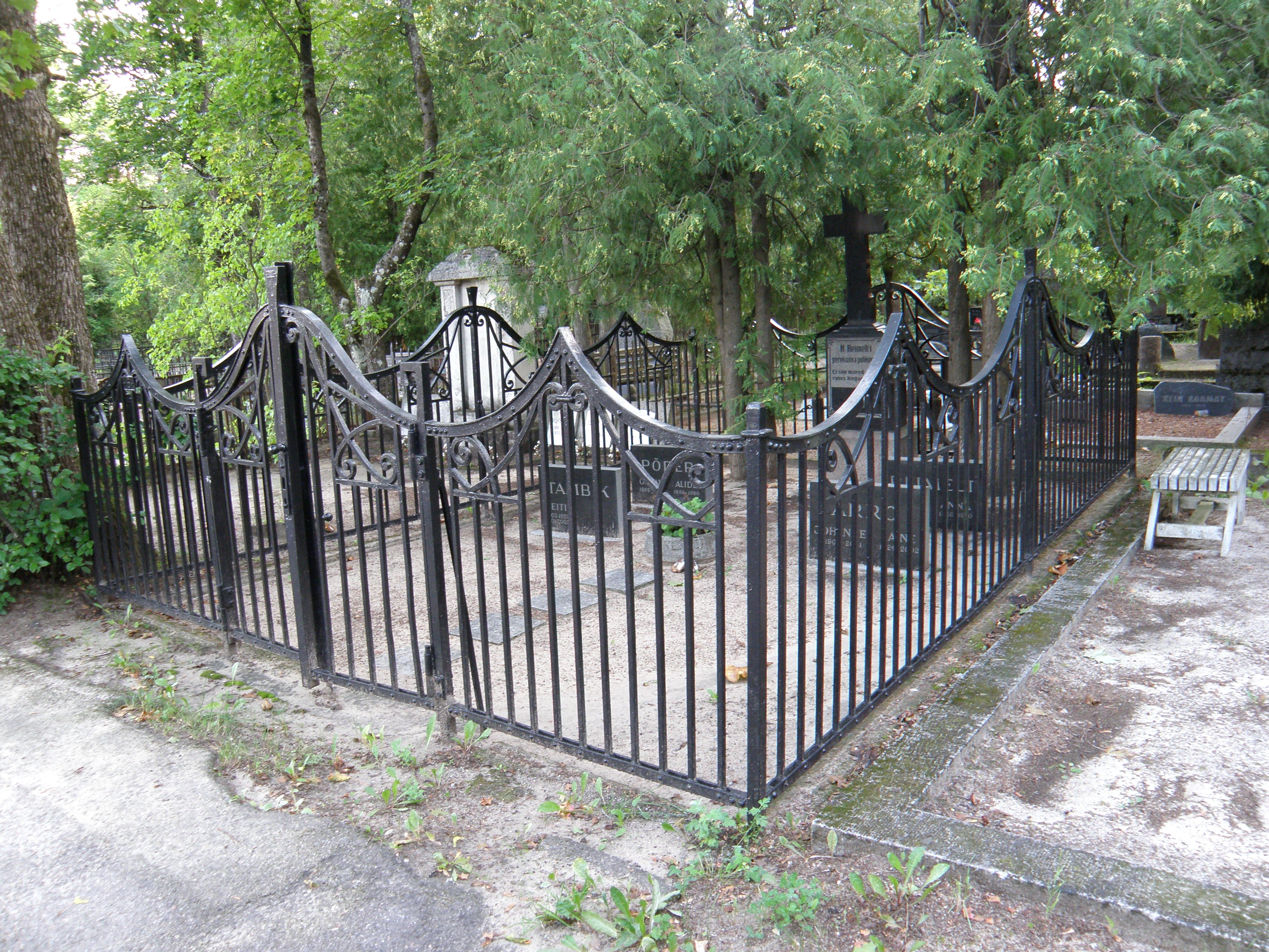 Sepistara perek. H. Reimelti matmispaigas